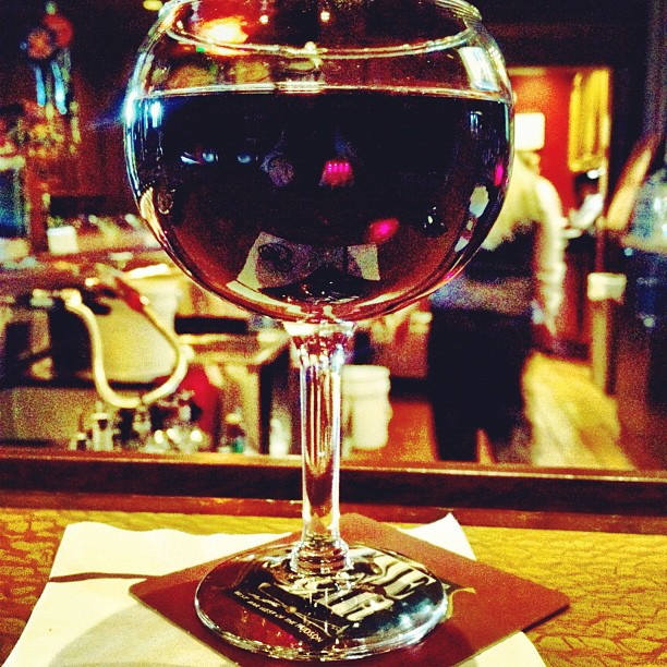 Friendly bartender.